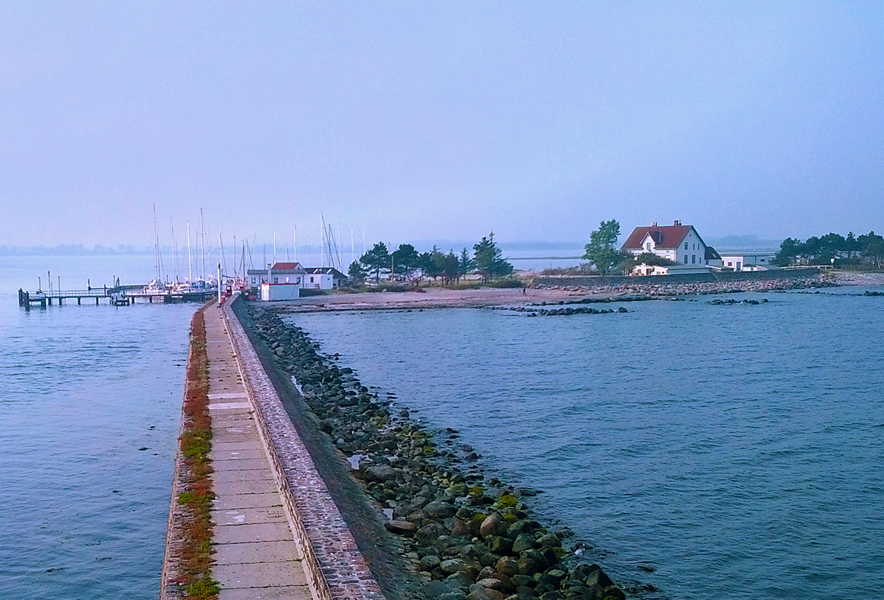 Die Lotseninsel vom Schleimünder Leuchtturm aus aufgenommen.